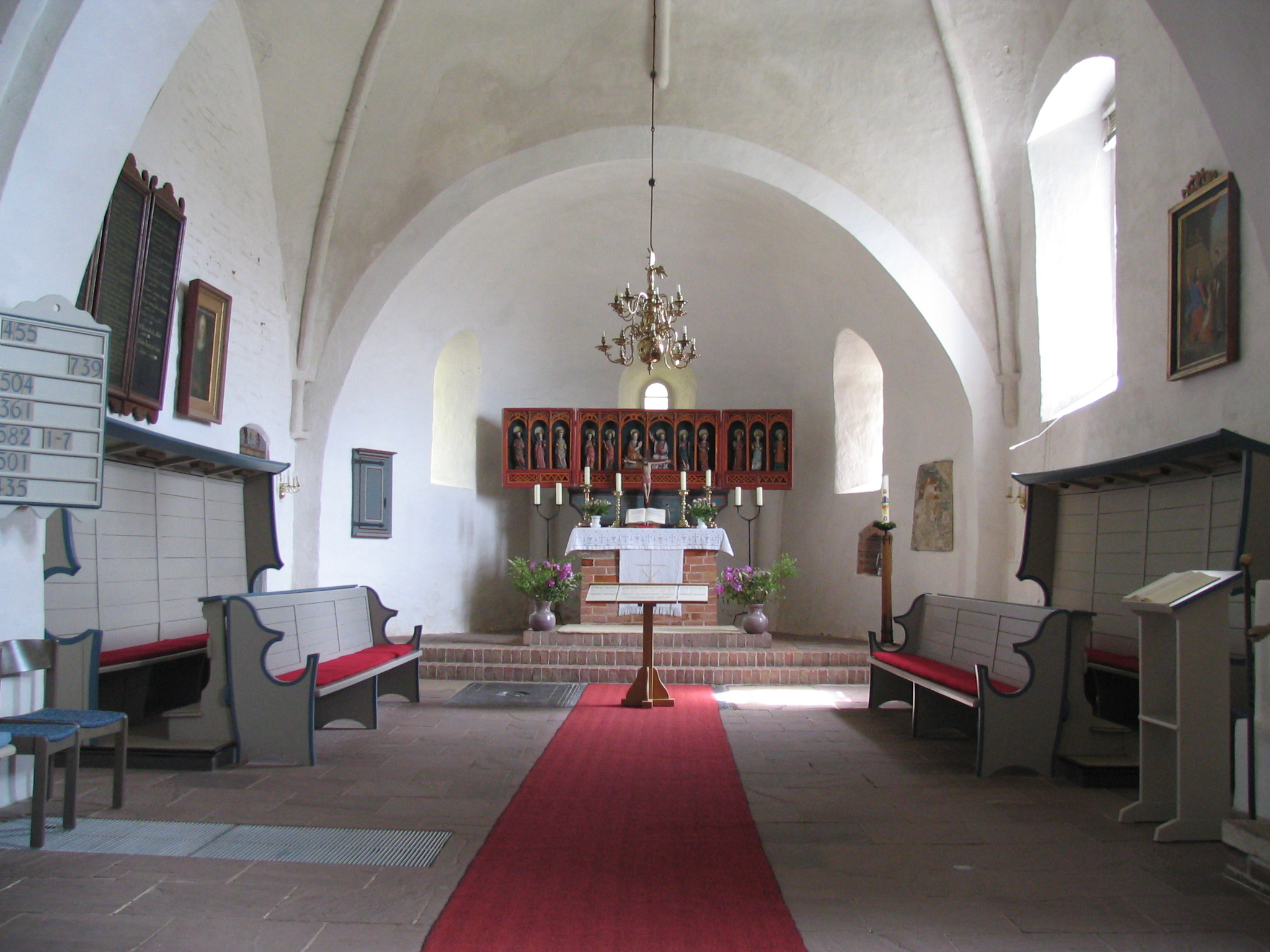 Der mittelalterliche Altar der Kirche St. Laurentii auf Föhr